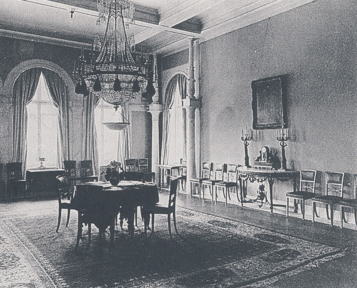 Byströms villa på Djurgården i Stockholm, interiör